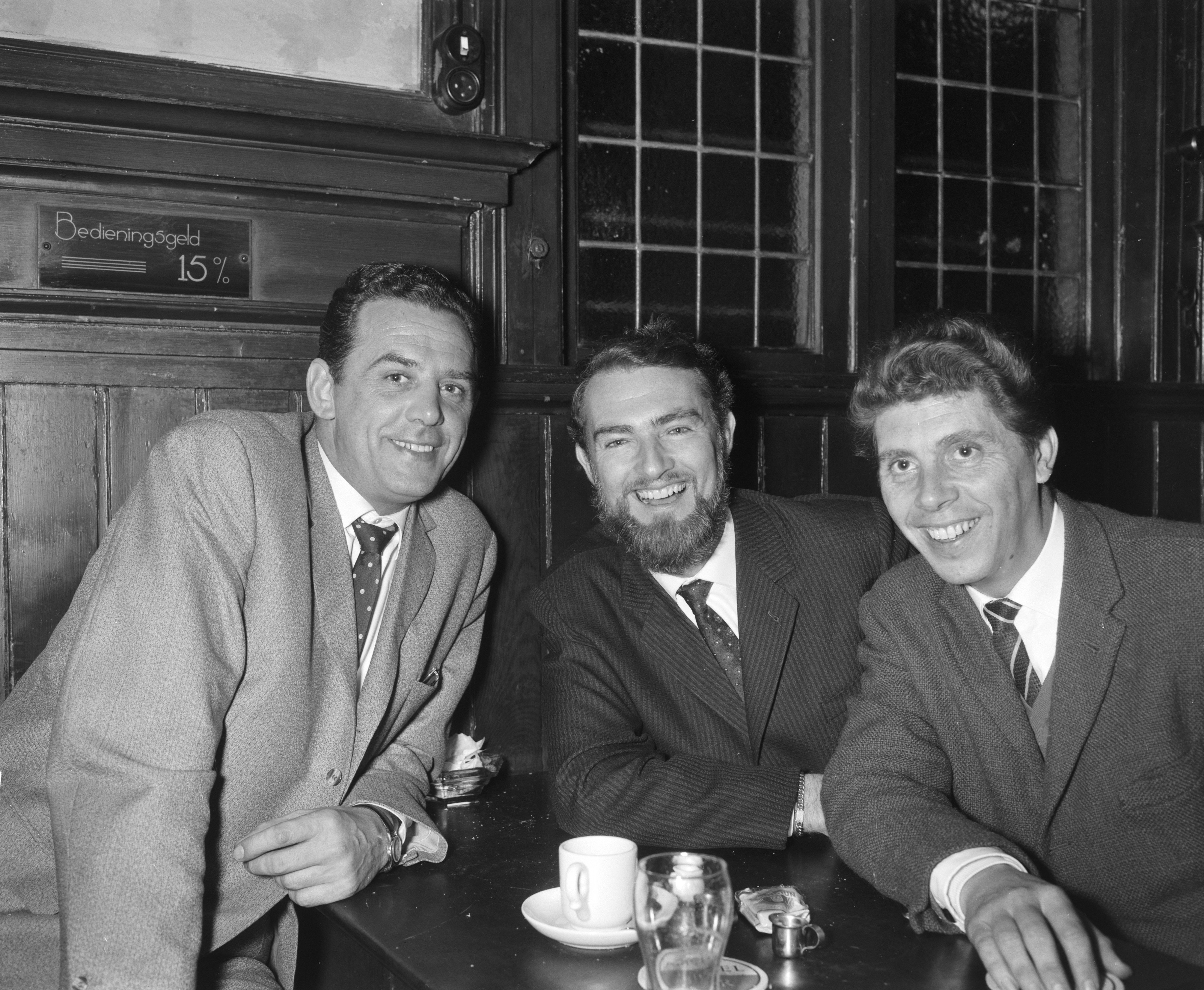 Collectie / Archief : Fotocollectie Anefo Reportage / Serie : [ onbekend ] Beschrijving : Het Cocktail Trio zal in het nieuwe seizoen optreden in Renee Sleeswijk's 25ste Snip en Snap Revue Annotatie : Opdracht Telegraaf. Vlnr. Ad van der Gein, Tony More en Carel Alberts Datum : 14 november 1961 Trefwoorden : bands, musici Persoonsnaam : Alberts, Carel, Gein, Ad van der, More, Tony Instellingsnaam : Telegraaf Fotograaf : Bilsen, Joop van / Anefo Auteursrechthebbende : Nationaal Archief Materiaalsoort : Negatief (zwart/wit) Nummer archiefinventaris : bekijk toegang 2.24.01.04 Bestanddeelnummer : 913-1797